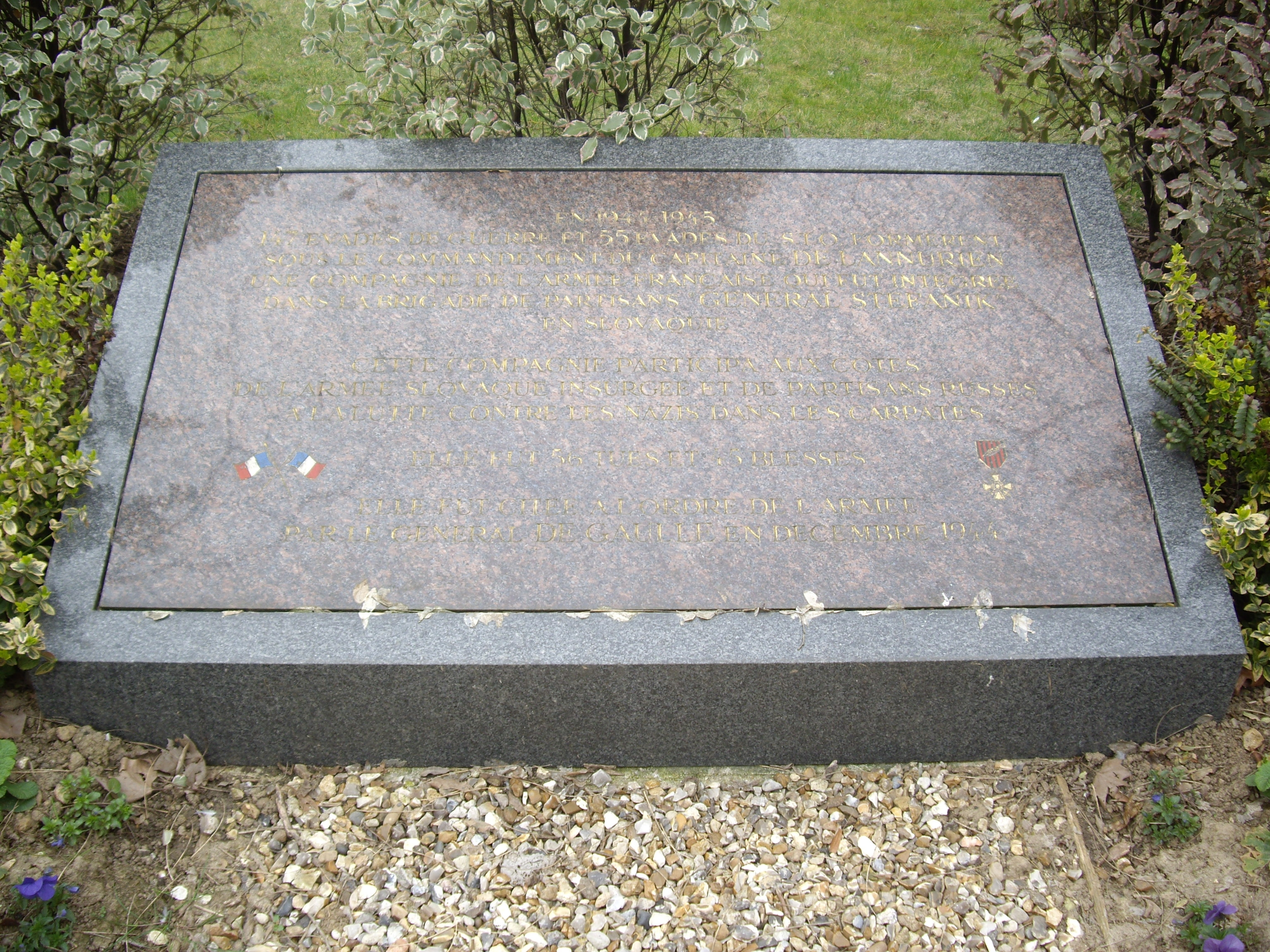 Plaque commémorative, place du Général-Stefanik, Paris 16e. « En 1944-1945, 147 évadés de guerre et 55 évadés du STO formèrent sous le commandement du capitaine de Lannurien une compagnie de l’armée française qui fut intégrée dans la brigade de partisans « Général Stefanik » en Slovaquie. Cette compagnie participa aux côtés de l’armée slovaque insurgée et de partisans russes à la lutte contre les nazis dans les Carpates. Elle eut 56 tués et 45 blessés. Elle fut citée à l’ordre de l’armée par le général de Gaulle en décembre 1944. »